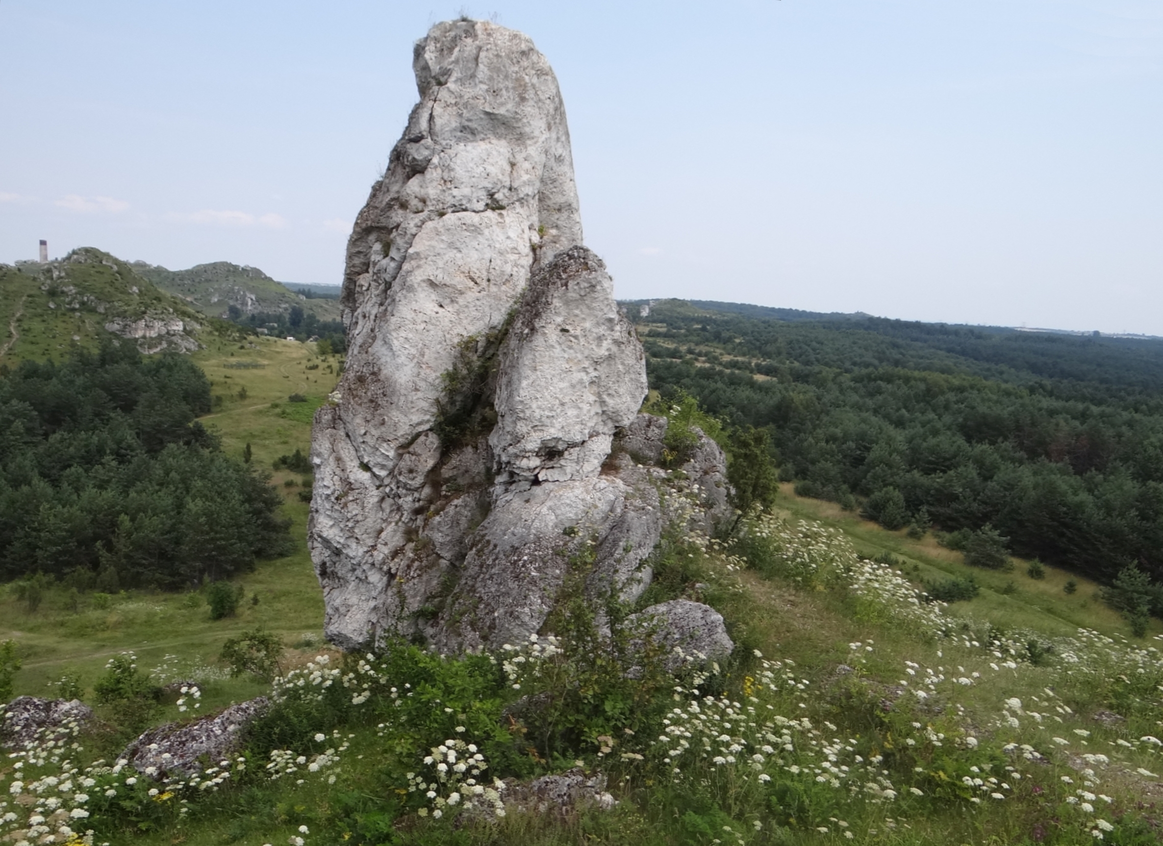 Skała Mnich w masywie Biakła koło Olsztyna